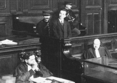 Avni Rüstemi Fransa'da Yargılanırken